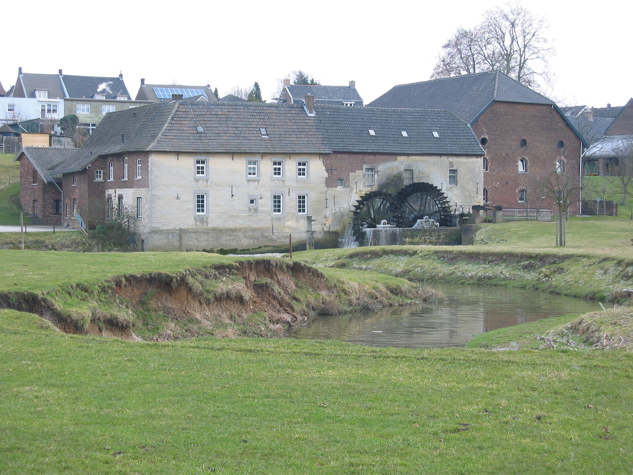 watermolen van familie Otten in de Geul bij Wijlre naast de Brand bierbrouwerij